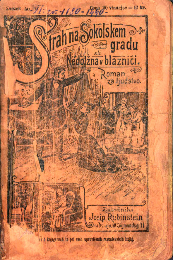 Naslovnica romana Strah na Sokolskem gradu